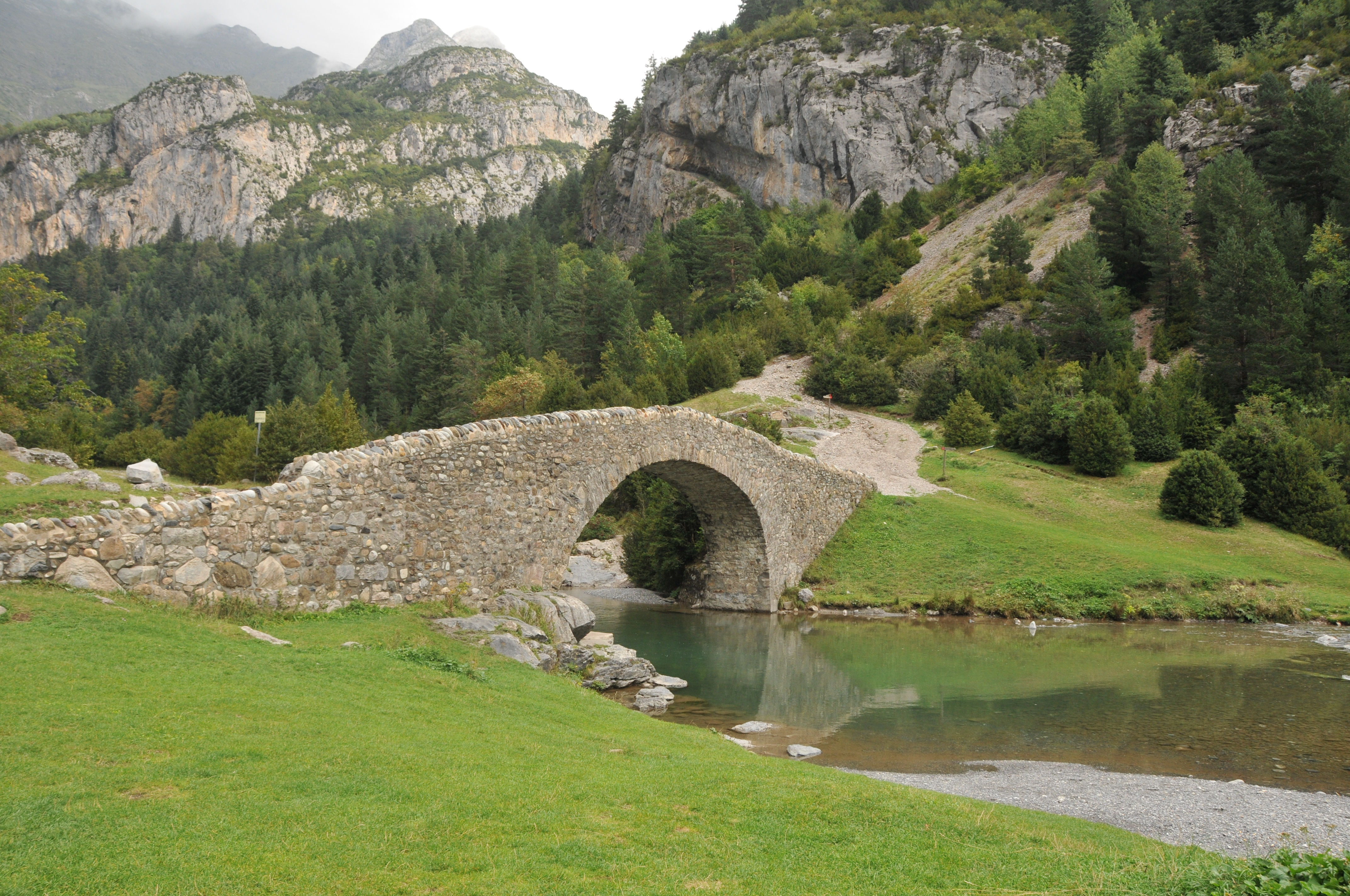 PUENTE EN SAN NICOLAS DE BUJARUELO